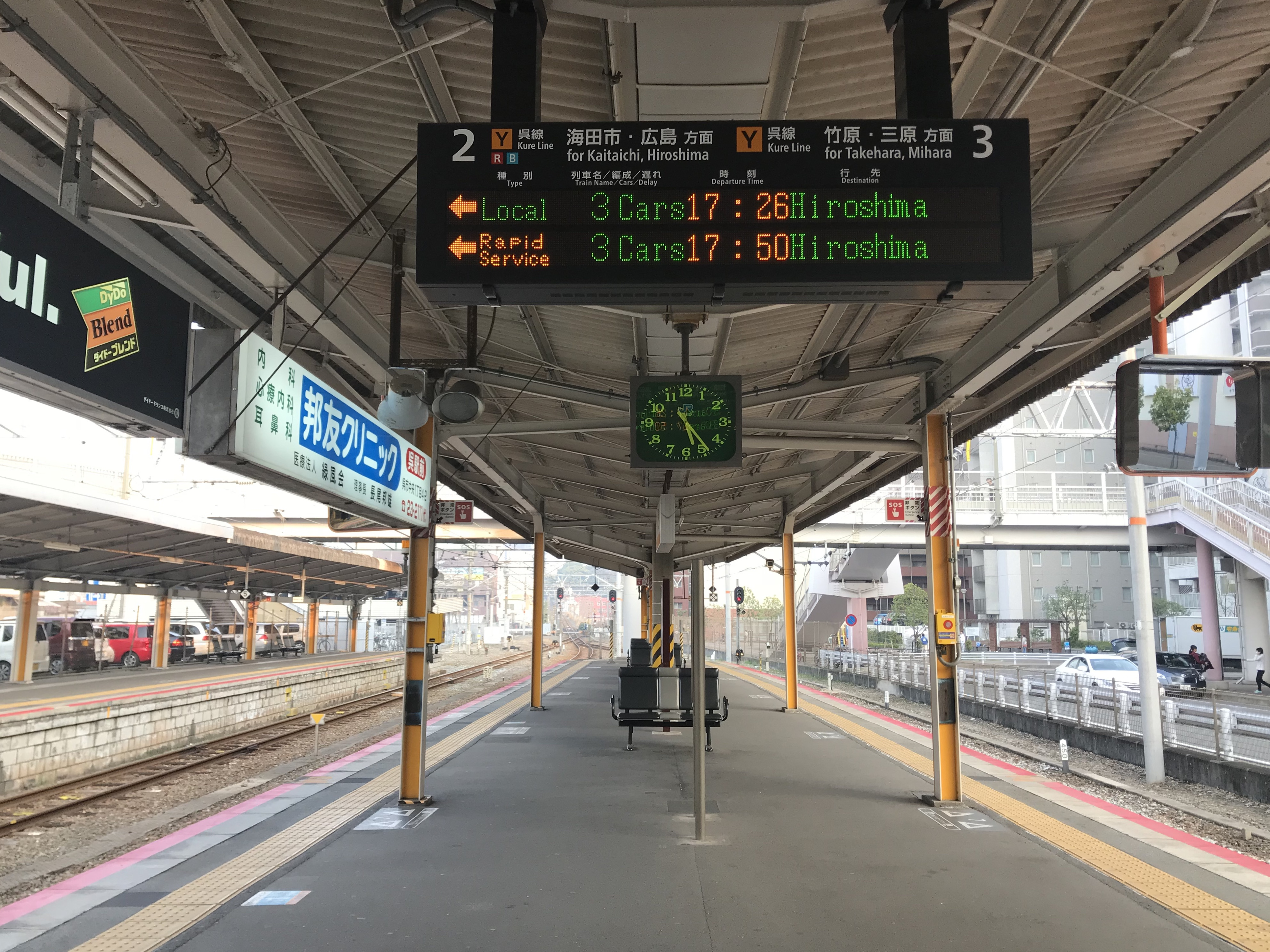 呉駅のホーム(奥は安芸阿賀方面)